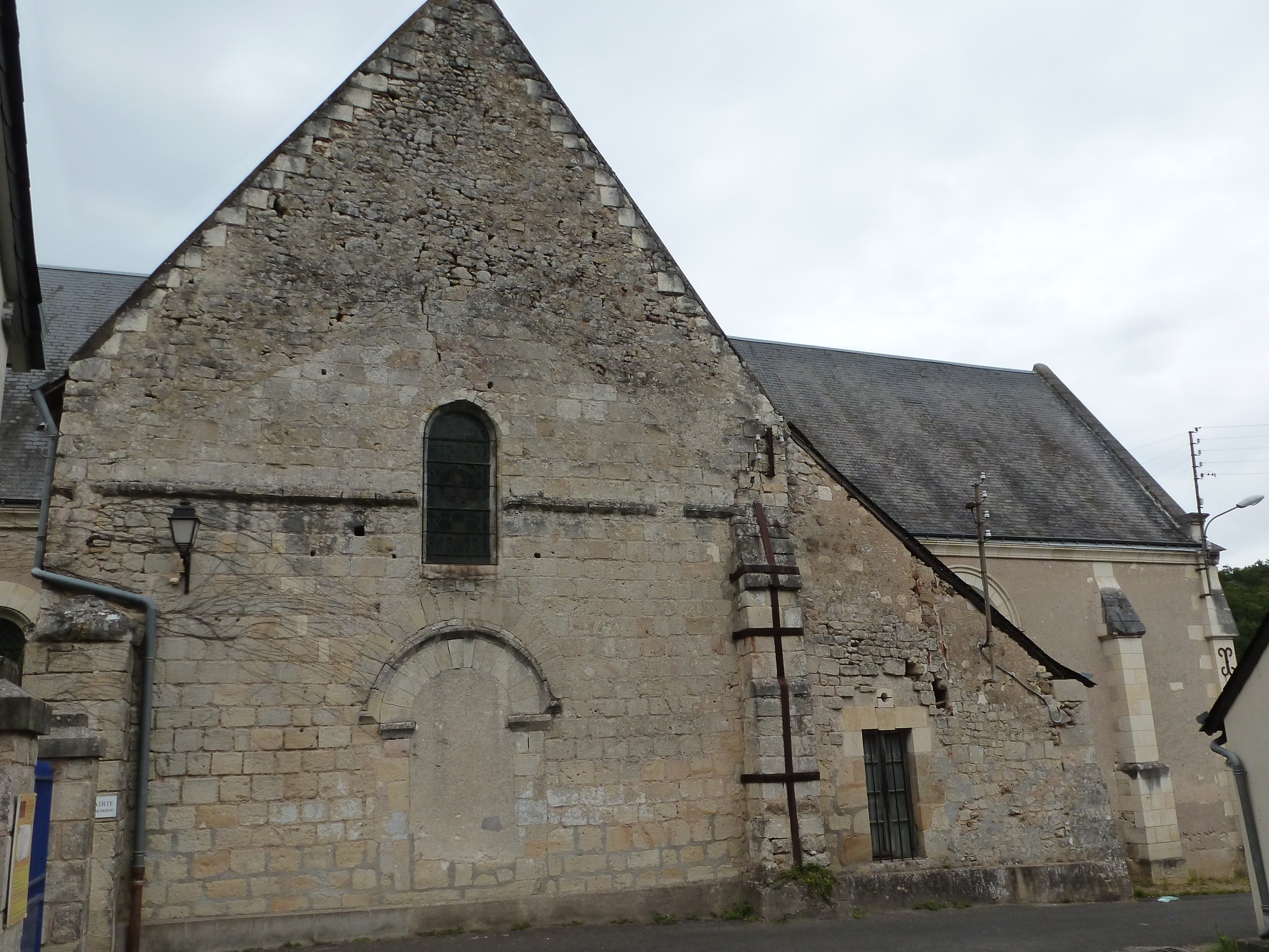 Ancienne église romane du XII° siècle, orientée Est-Ouest, à Villaines-les-Rochers, partiellement réutilisée lors de la construction de la nouvelle.